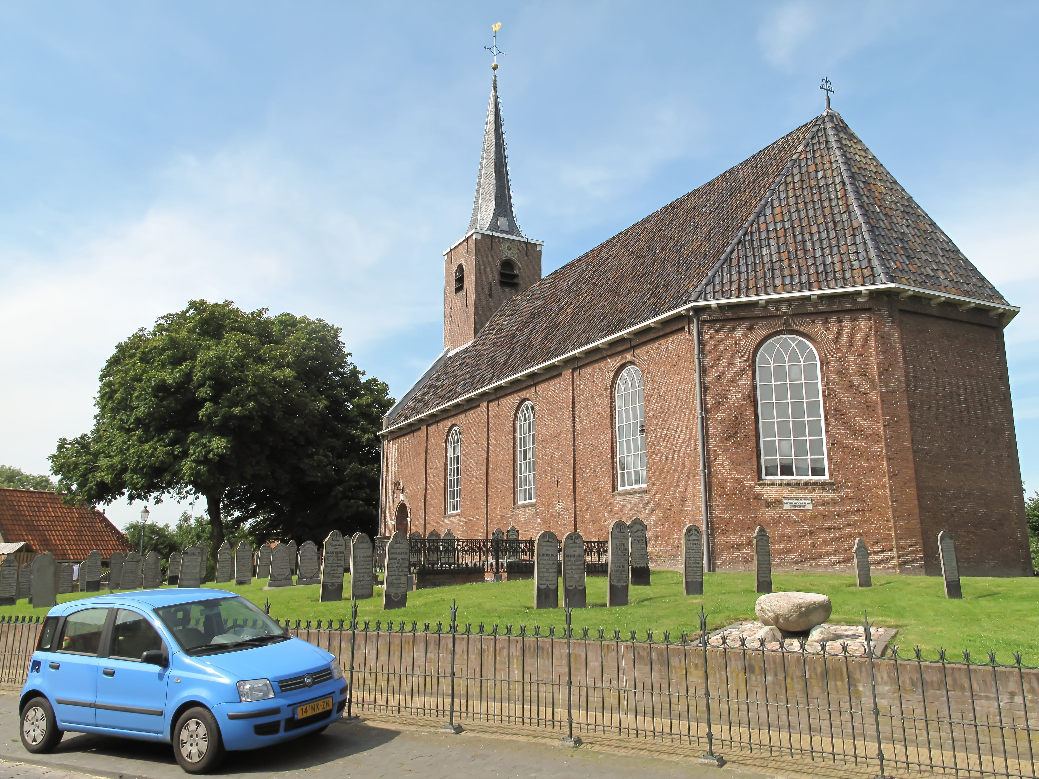 Burum, de Nederlands Hervormde kerk